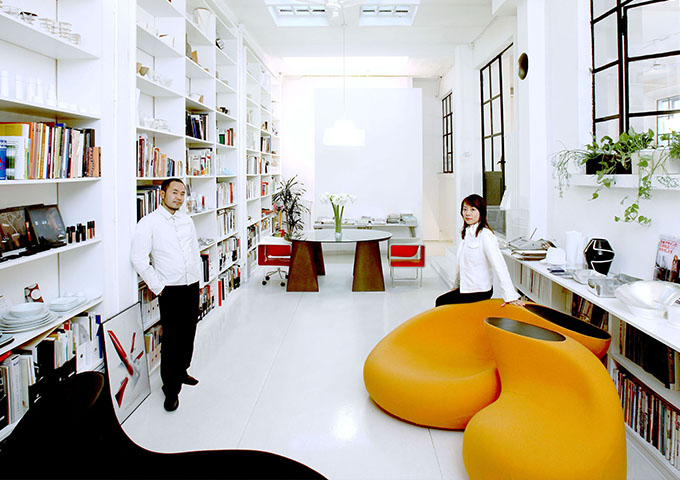 SETSU&SHINOBU ITO